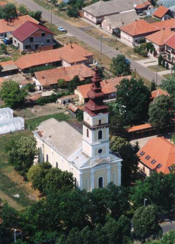 Nagybánhegyes, Hungary, aerialphotography